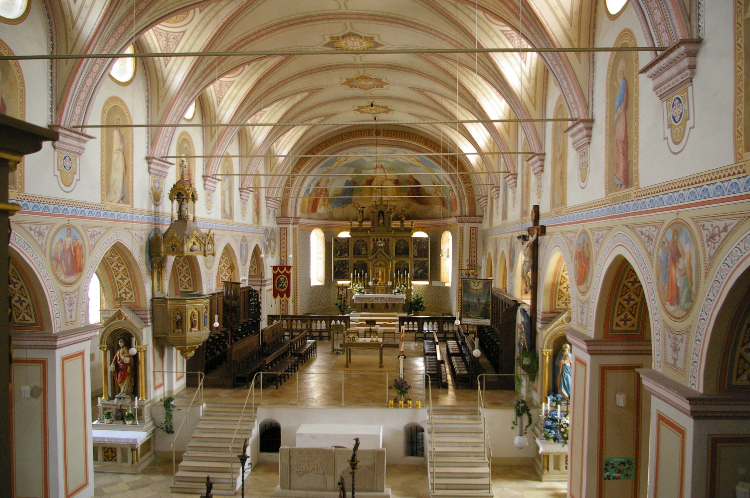 Kirche St. Arsacius in Ilmmünster, Innenraum vom Chor aus.